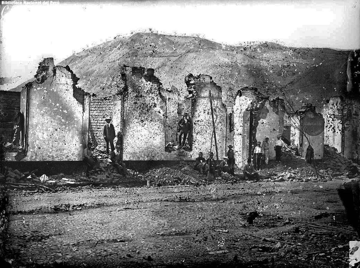 Chorrillos (Destruido por los Chilenos). Vista de los efectos de la invasión chilena en el pueblo deChorrillos, luego de la derrota de las fuerzas peruanas en la batalla de San Juan (1881). Ejemplar en positivo en F/985.061/Ch76/1 y CU:2/31A.